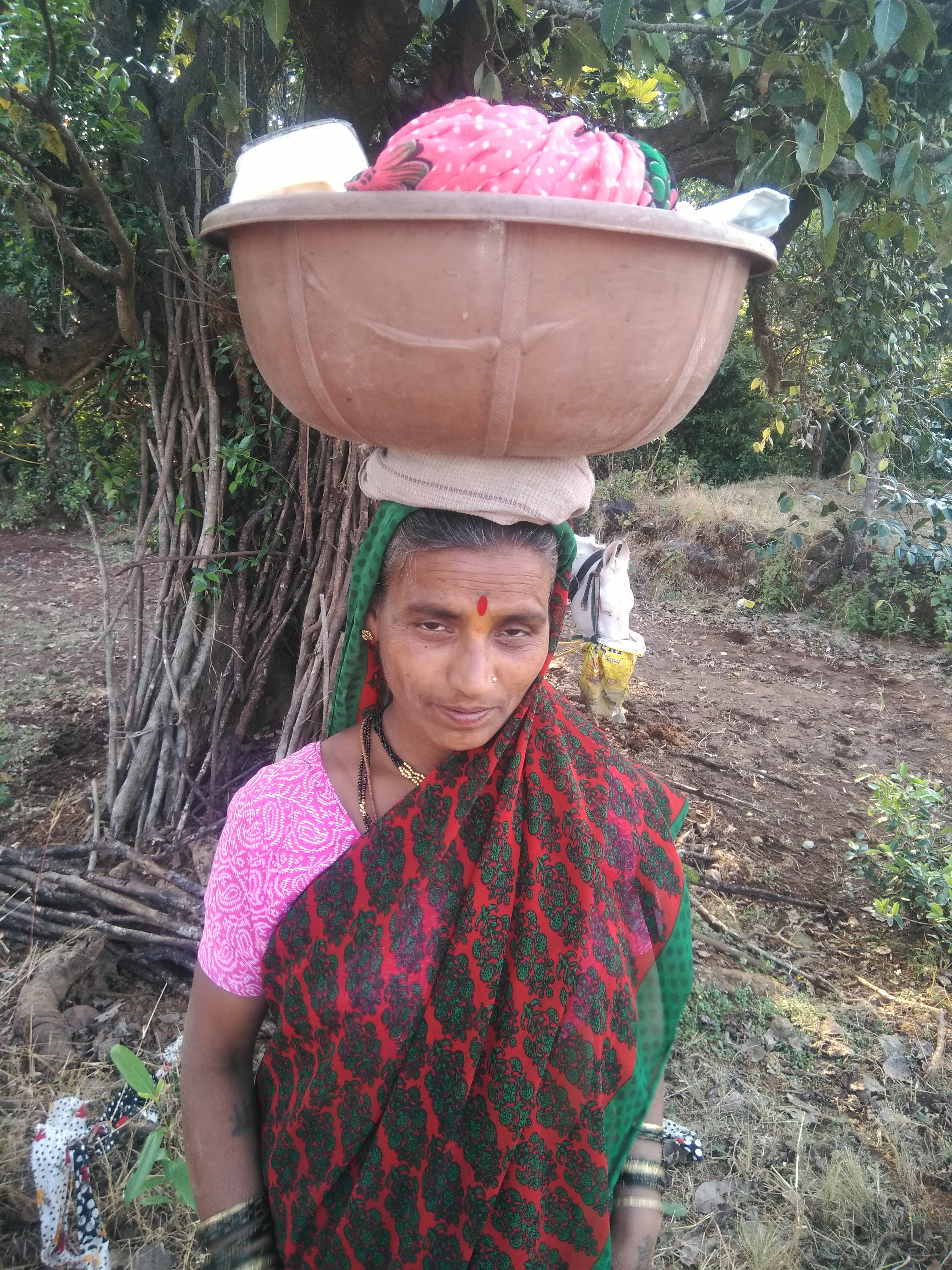 टोपलीखाली चुंबळ